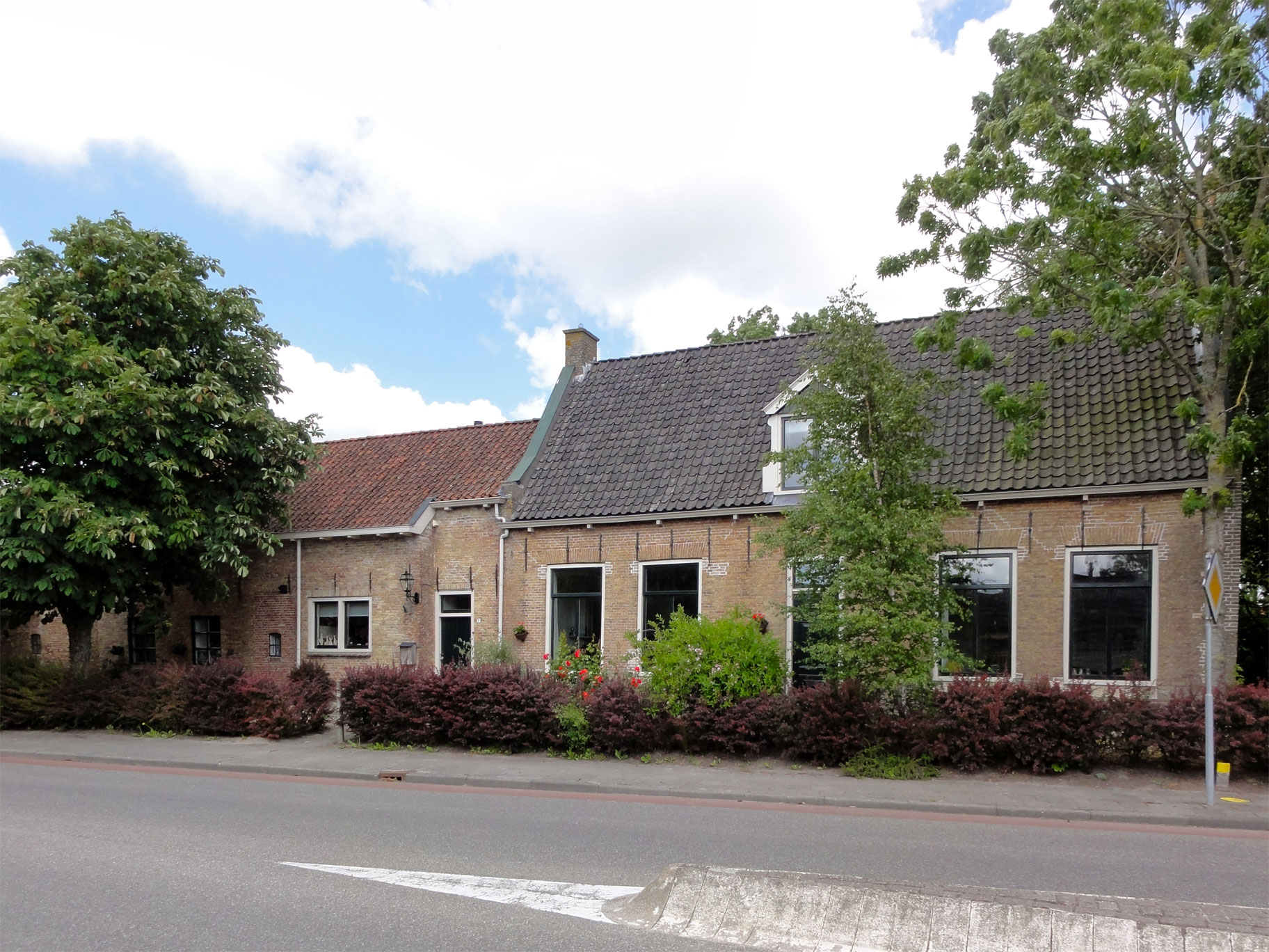 Kadal 2 in Sint-Jacobiparochie